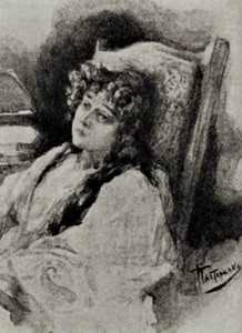 Nina, la protagonista del dramma in versi di M. Ju. Lermontov «Un ballo in maschera», in un disegno di Leonid Pasternak